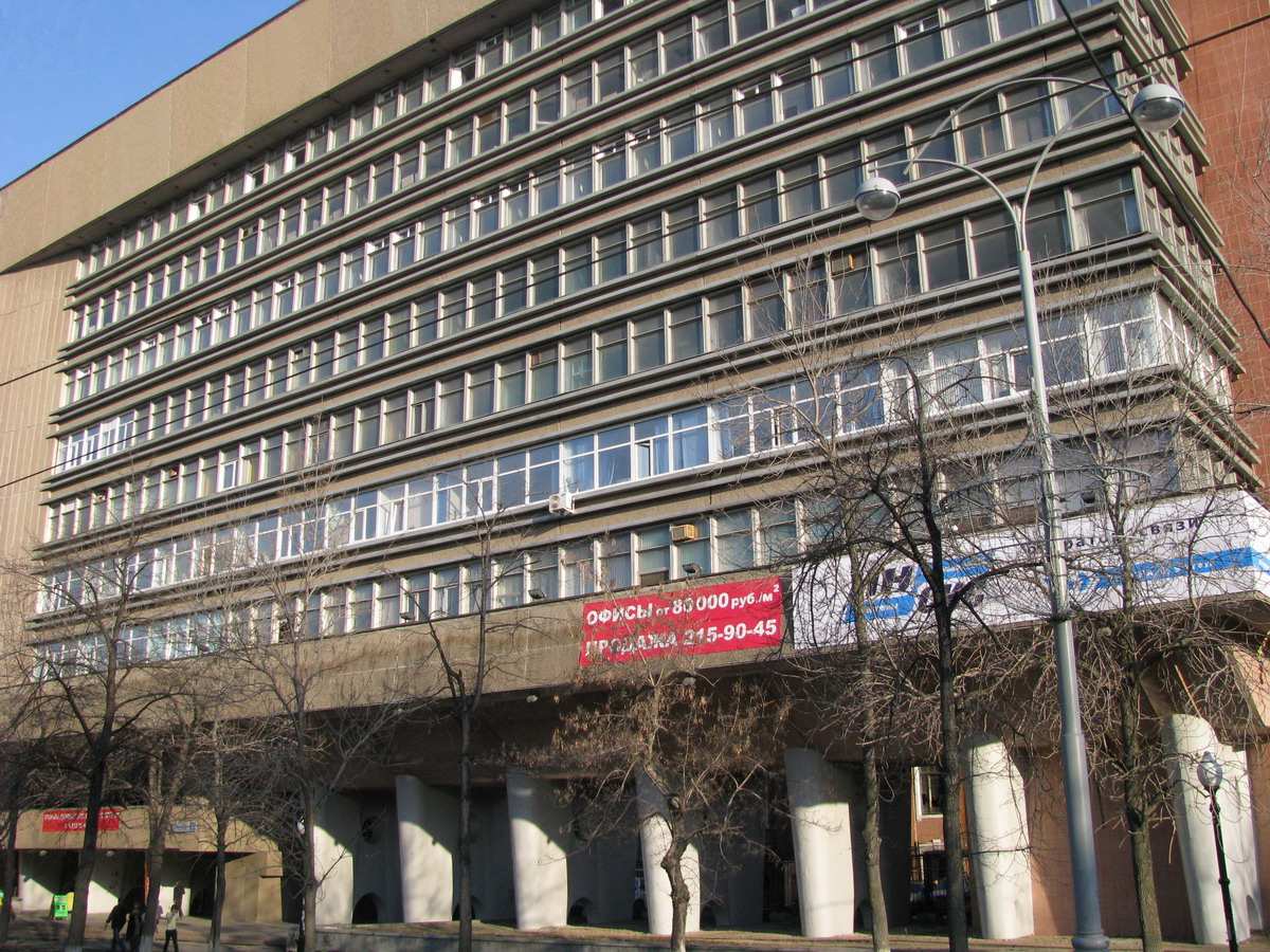 Инженерный корпус завода ОЦМ в Екатеринбурге. Здание охраняется ЮНЕСКО как памятник архитектуры конструктивизма. Особенность конструкции здания в том, что оно полностью стоит на сваях.